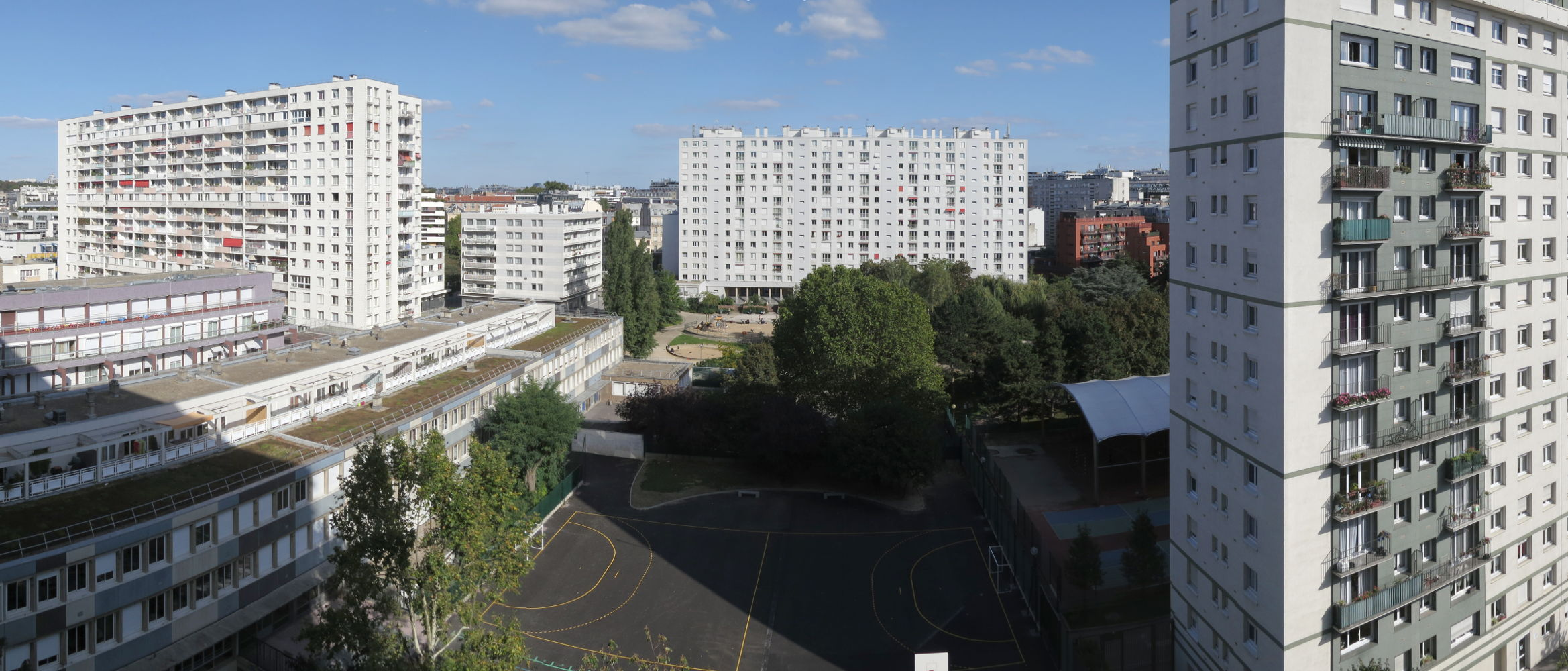 Vue de l'îlot Saint-Éloi, vers l'est, Paris, 12e arrondissement